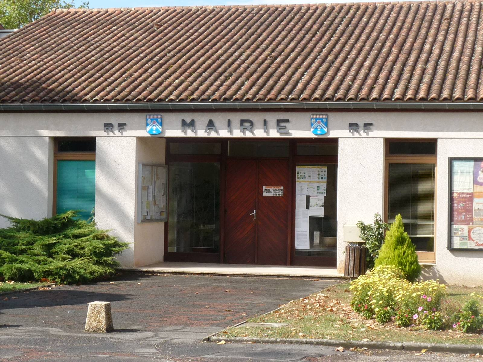 mairie de Maine-de-Boixe